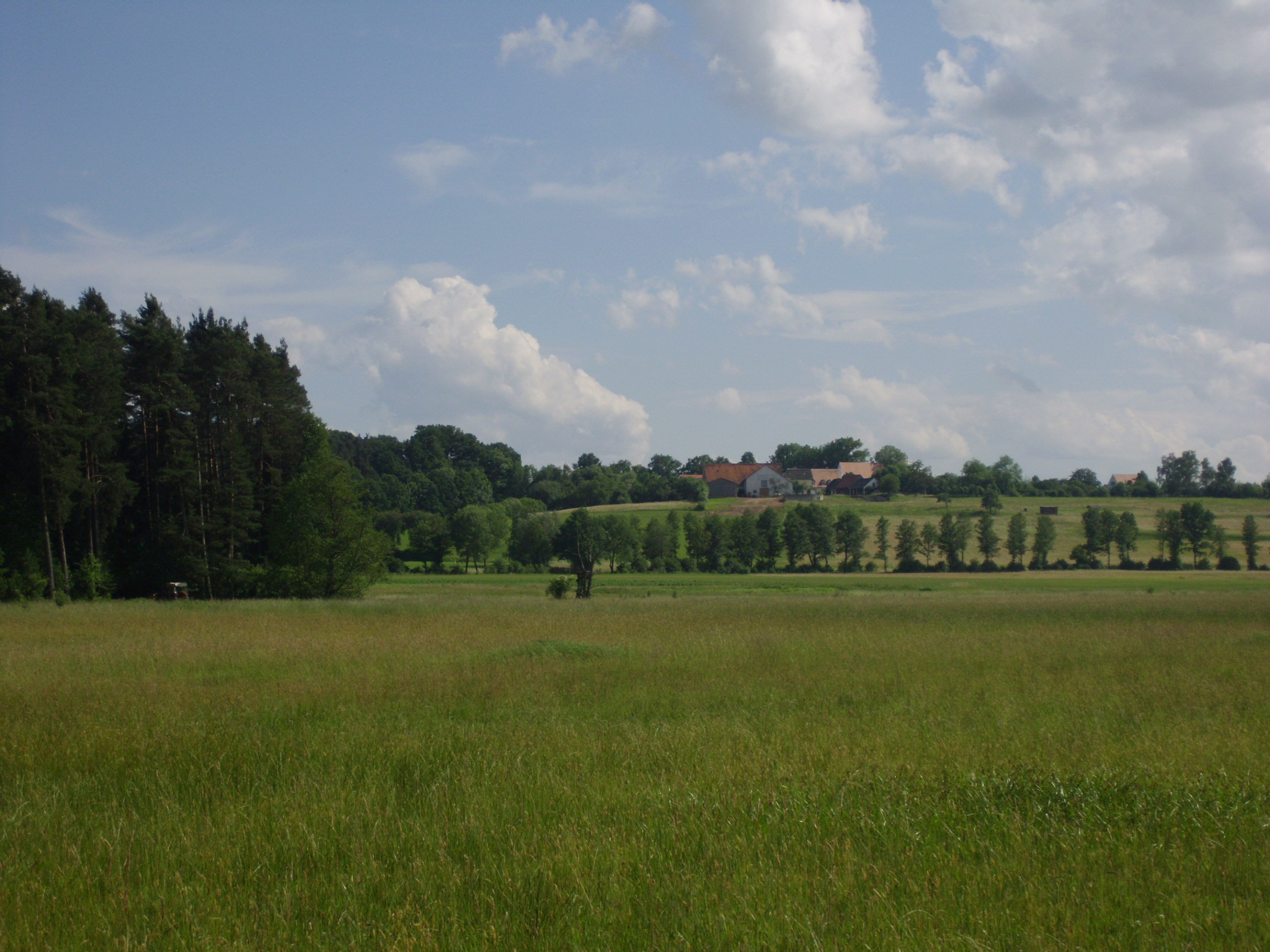 Wehlenberg, Ortsteil von Muhr an See im mittelfränkischen Landkreis Weißenburg-Gunzenhausen